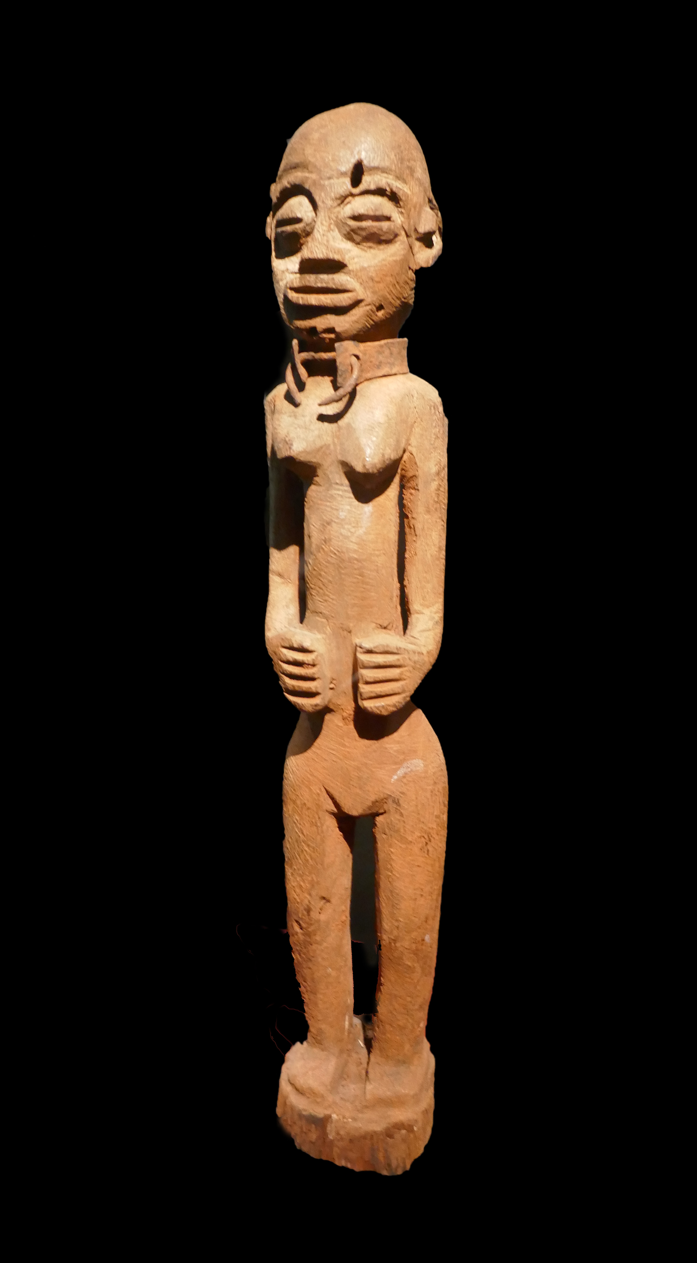 Fétiche Fon. Bénin, début du 20e siècle. Collection particulière. Utilisé dans le culte Vaudou. Le collier de fer laisse supposer qu'il était utilisé dans un culte lié à l'esclavage. Musée d'Aquitaine, Bordeaux.